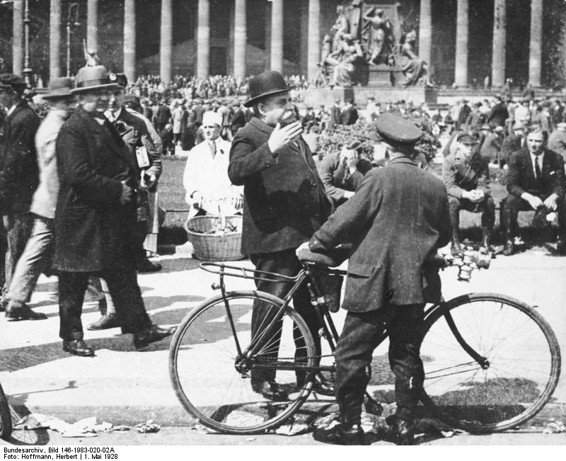 Der 1. Mai ganz im Zeichen der Arbeiter, Diskussionen im Berliner Lustgarten. Das waren noch Zeiten, als die Berliner nach der Wahl - vor Jahrzehnten im Berliner Lustgarten ihre Meinung äußern konnten, wie Ihnen der Schnabel gewachsen war, 1928.